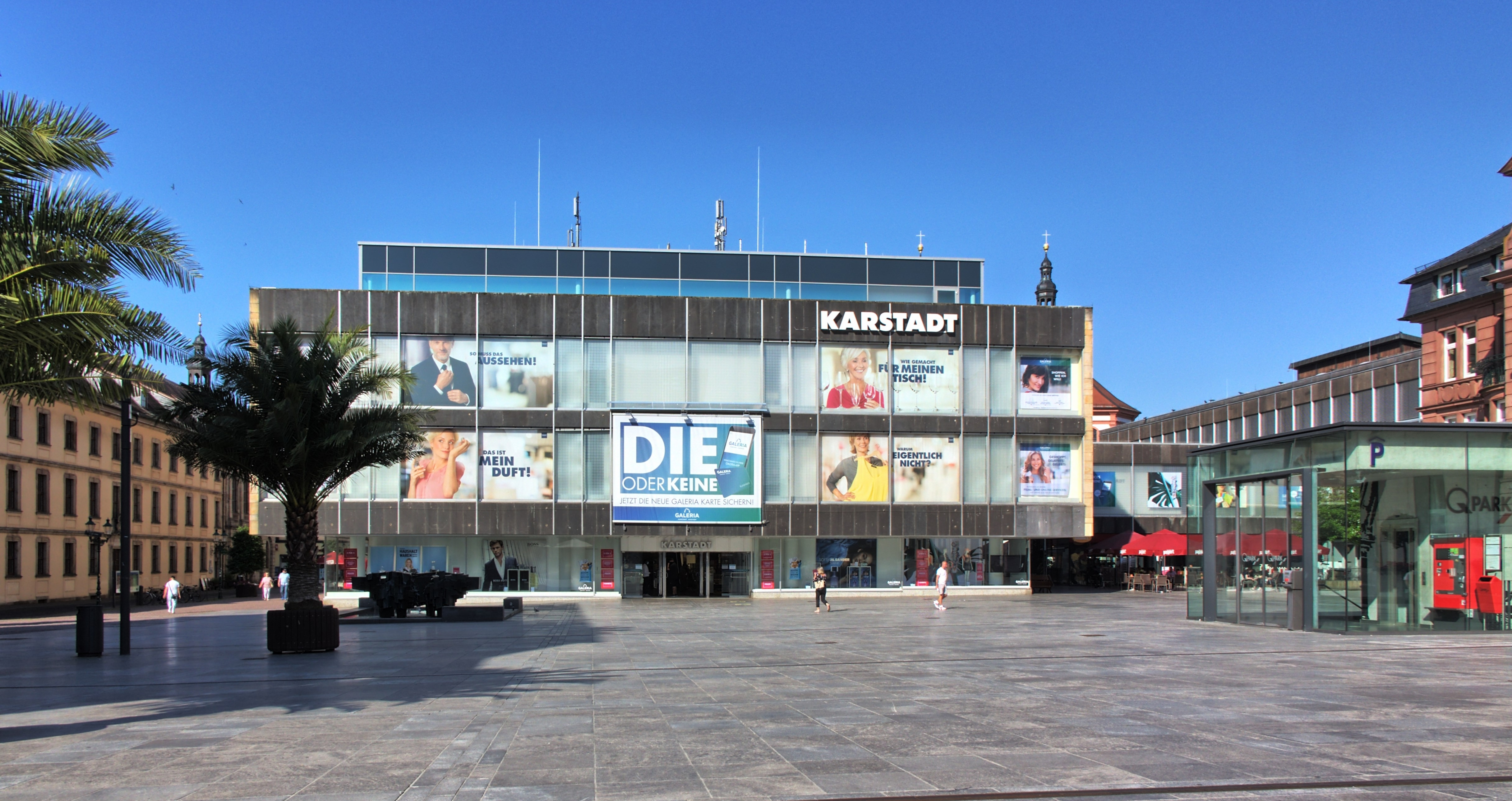 Ruf gestaltete in den Jahren 1961 bis 1964 sowohl den Universitäts- als auch den Borgiasplatz neu. Der Bau, von einer schwerelosen Transparenz der verglasten Gebäudeteile einerseits und den geschlossenen Bauteilen andererseits geprägt, fügt sich, obwohl der Moderne verpflichtet, ins historische Stadtbild ein, indem es unter der Traufhöhe der umstehenden Gebäude bleibt und sich ihnen gegenüber in der Farbigkeit zurücknimmt.